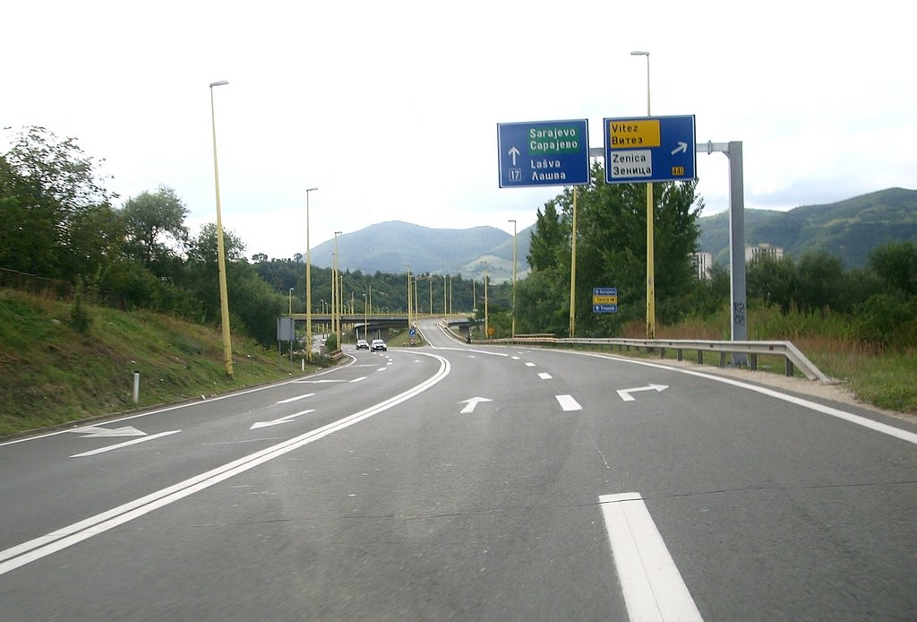 Ulaz u Zenicu sa M-17